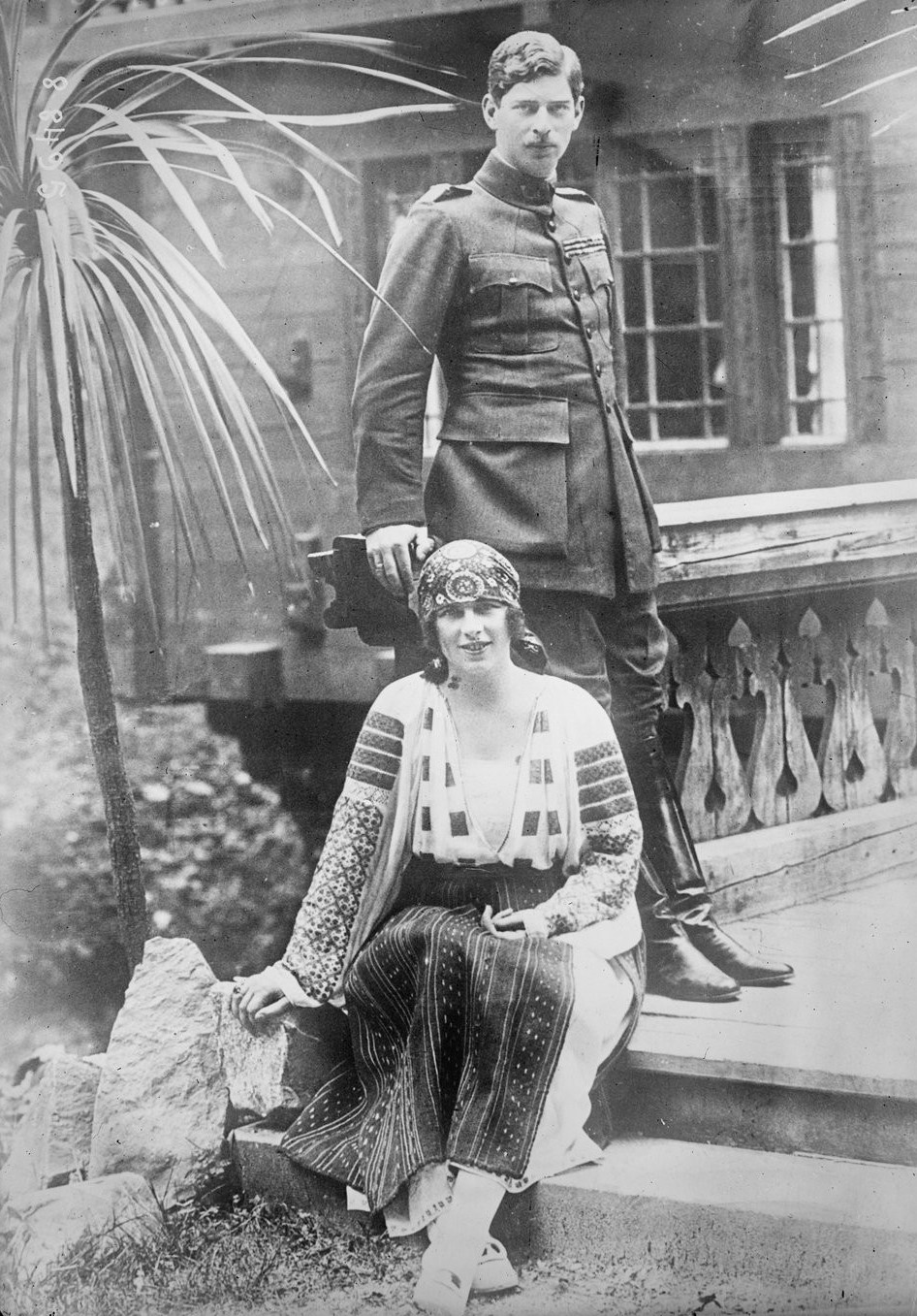 Le prince Charles héritier de Roumanie et sa femme, la princesse Hélène de Grèce.